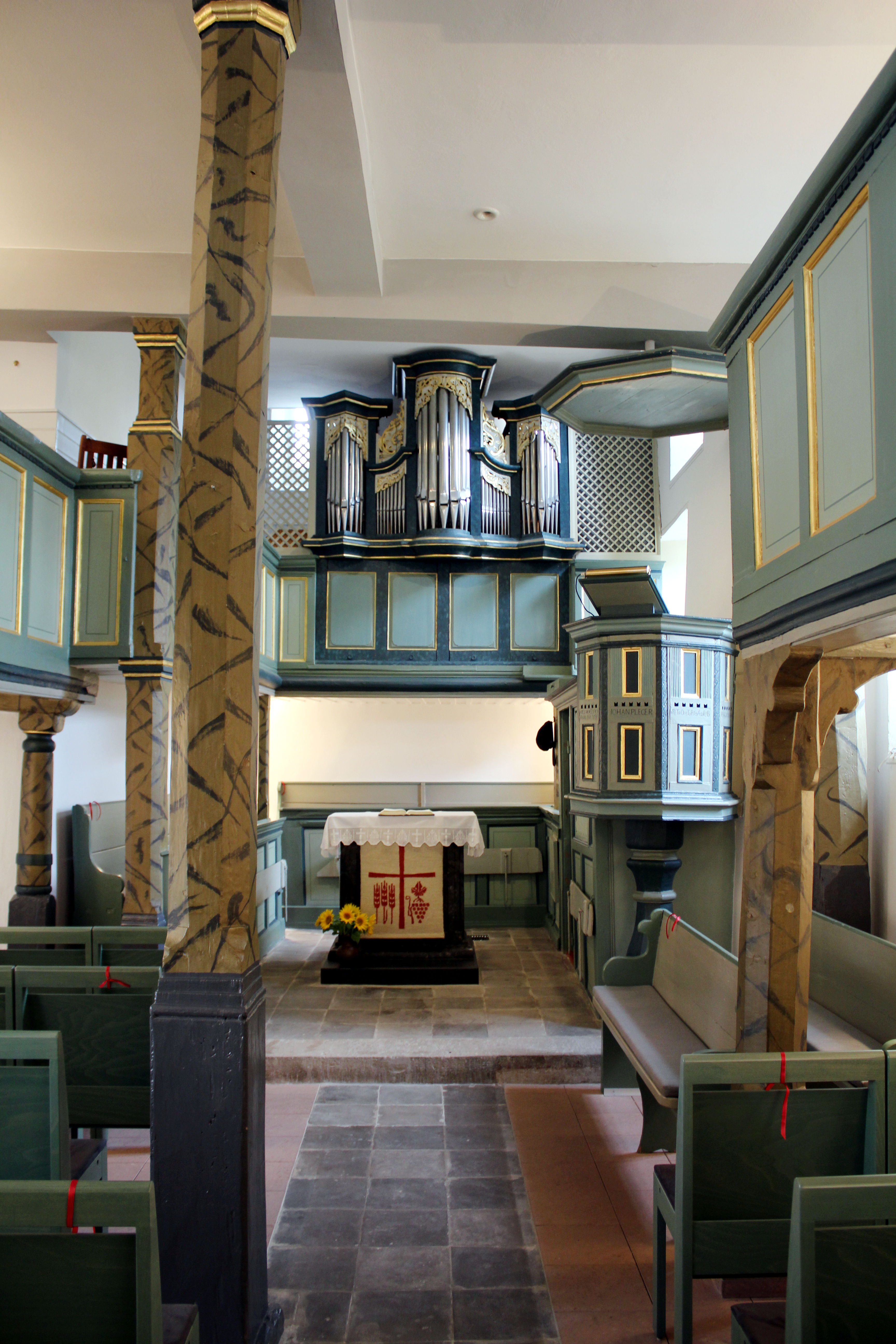 Ev. Kirche Laufdorf, Lahn-Dill-Kreis, Hessen, Deutschland